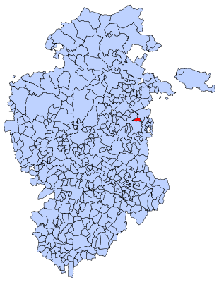 Fresno de Río Tirón En Burgos